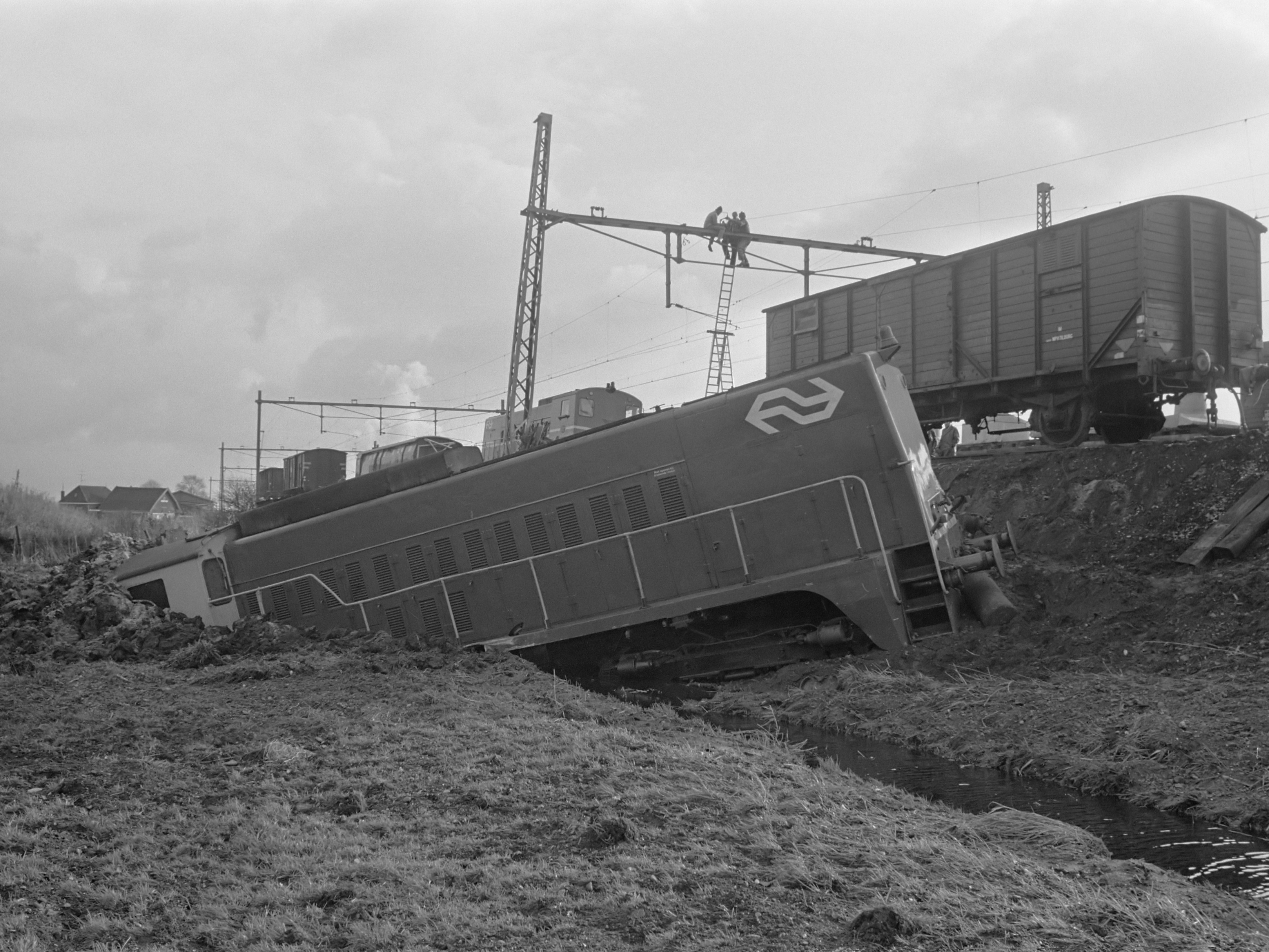 Locomotief ontspoord en in sloot terechtgekomen bij Halfweg 22 november 1972